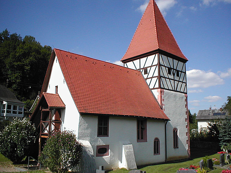 St.-Mauritius-Kirche in Osterburken-Hemsbach